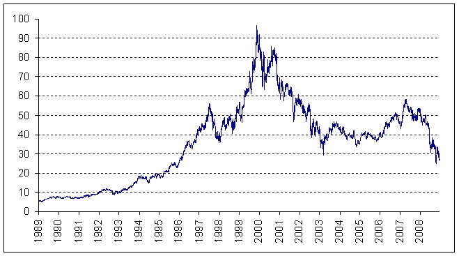 Cours de l'action Carrefour à la bourse de Paris de Janvier 1989 à Décembre 2007 en euro, retraité historiquement des opérations sur titre (divisions du nominal, dilution..) . Share price of Carrefour in euro from 1989 to 2008, restated from operations on shares that could impact nominal price.